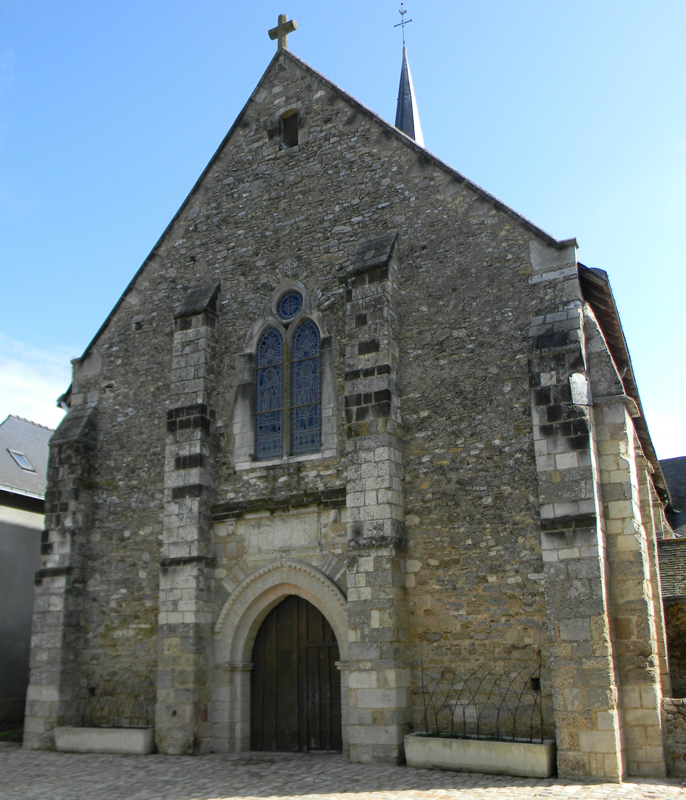 La façade ouest de l'église Notre Dame de Brissarthe avec ses quatre contreforts massifs.